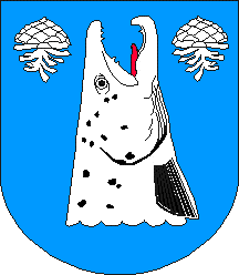 Loksa valla vapp